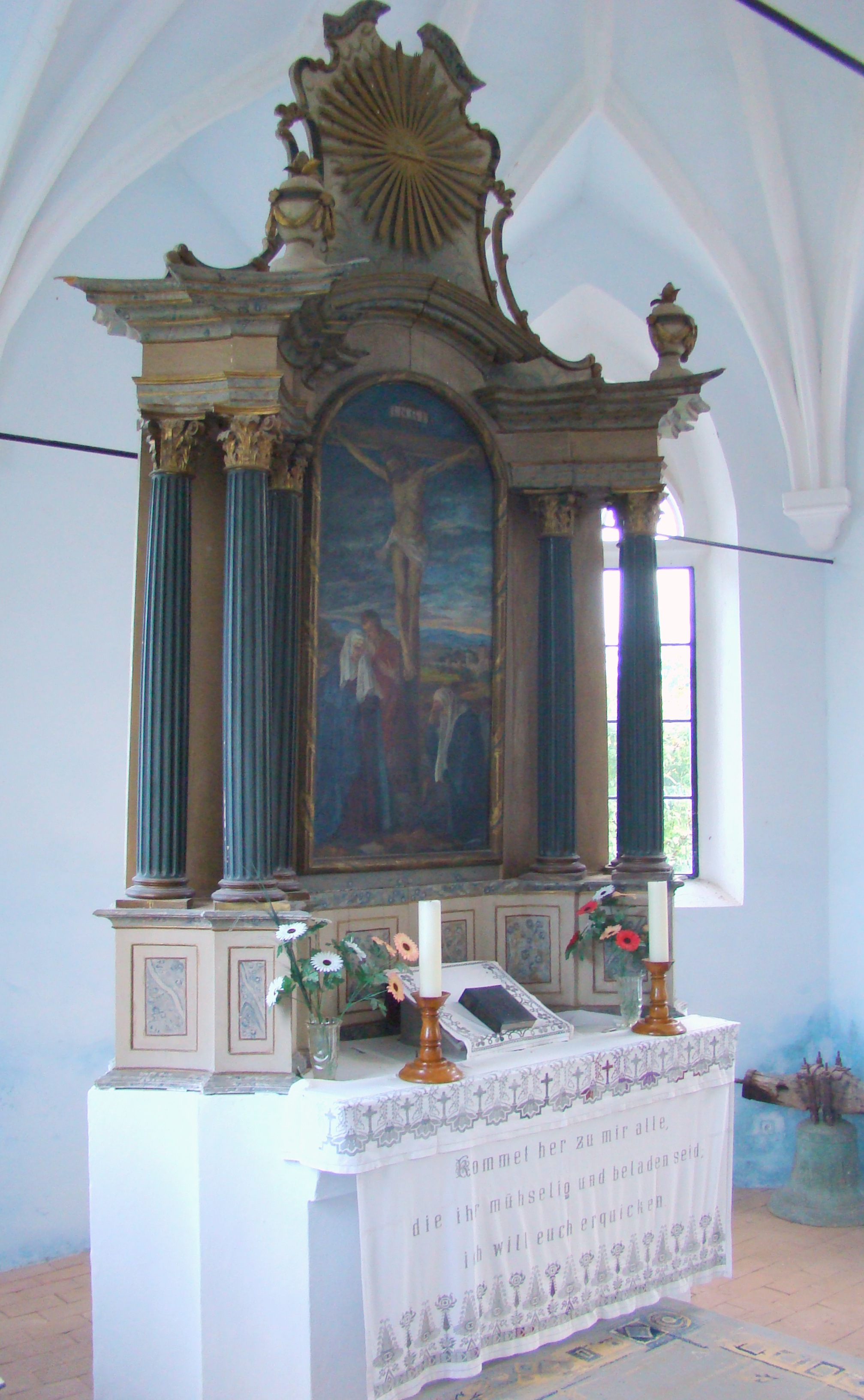 Biserica fortificată din Cenade, Alba